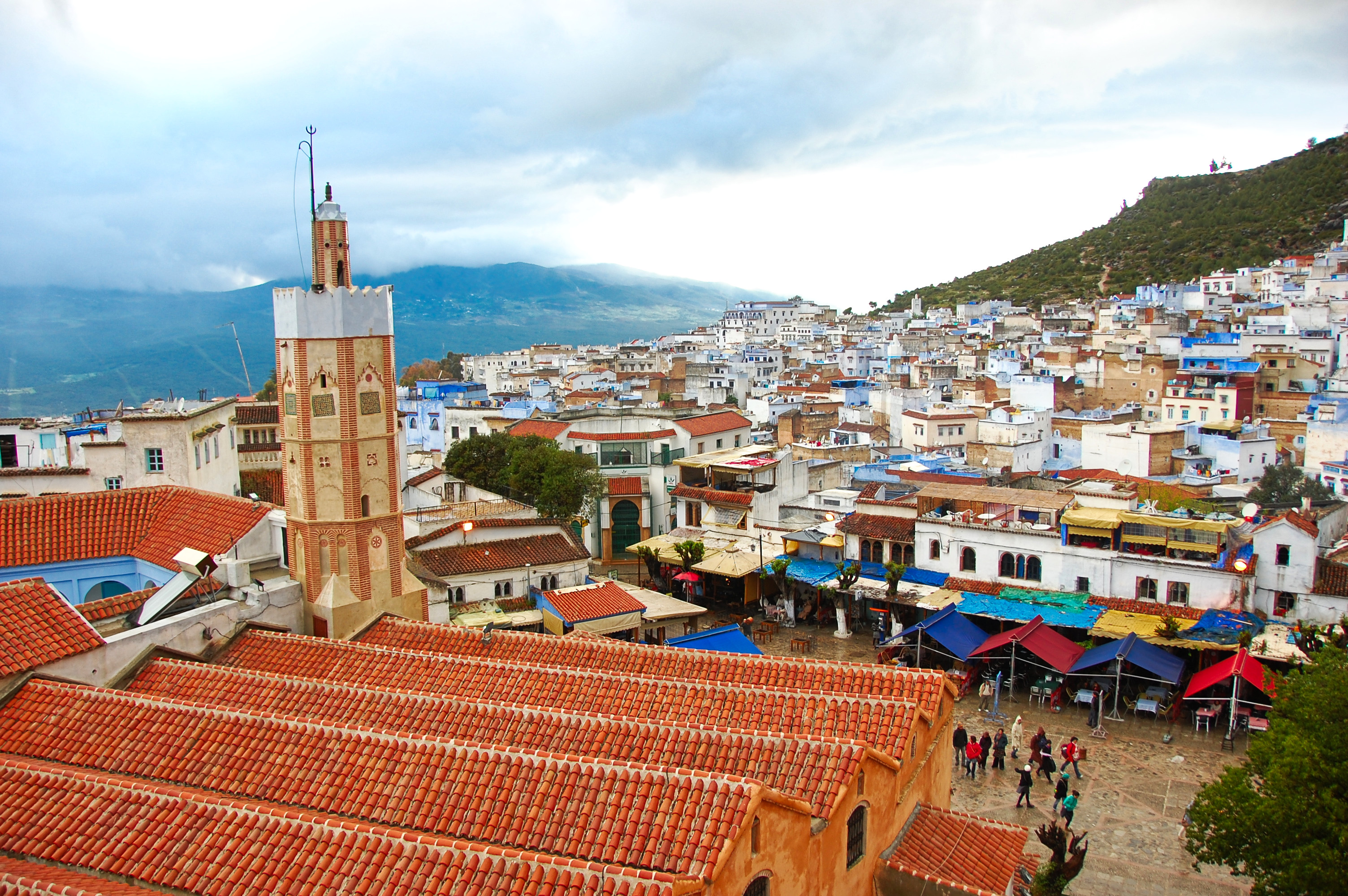 Vista de Xauen, en Marruecos.